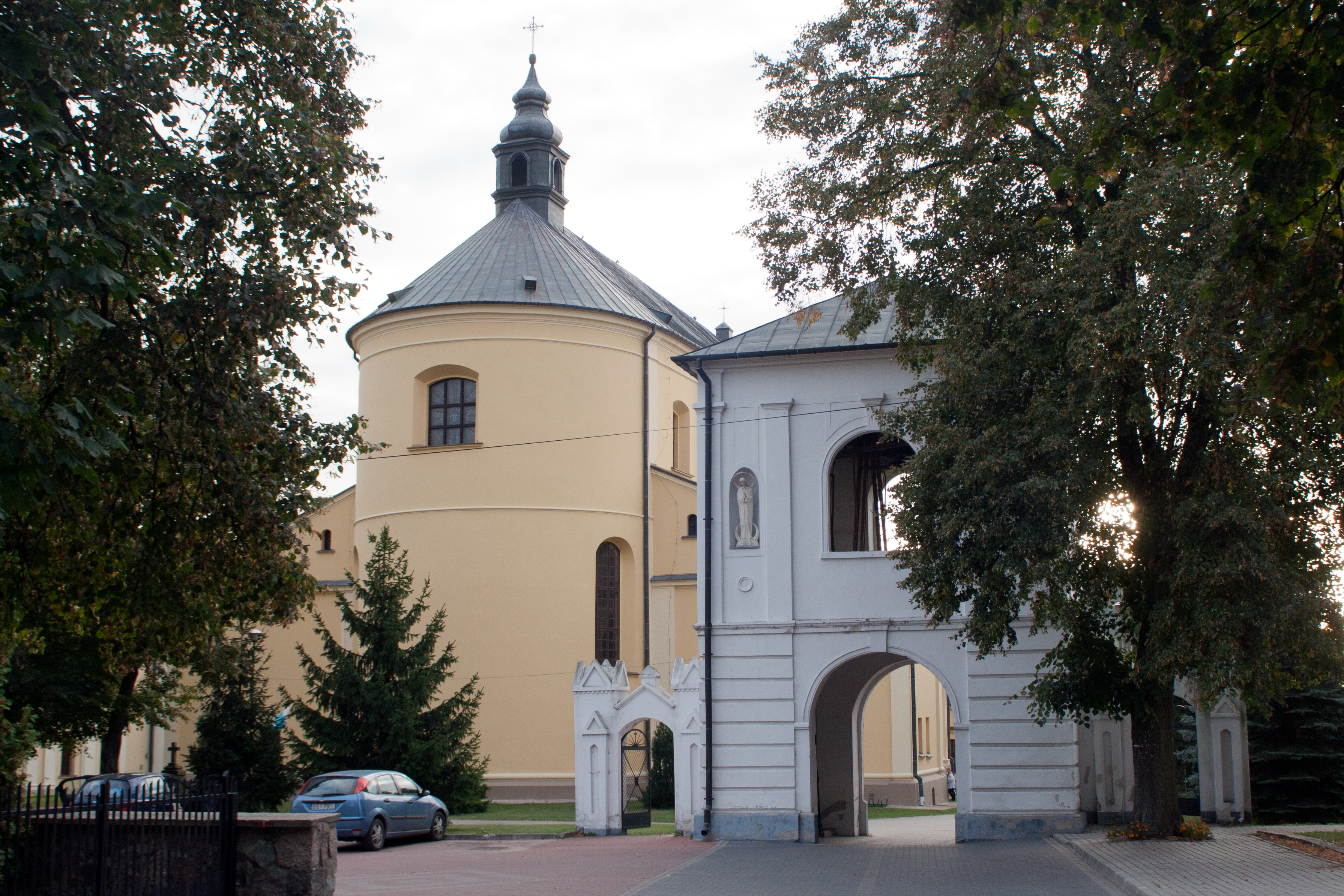 Drohiczyn, Kościół, ob. par. p.w. Św. Trójcy, w zespole klasztornym jezuitów, mur., 1709